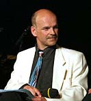 Wolfgang Dietrich (Politologe) auf der REAL Tagung in Wien 2006